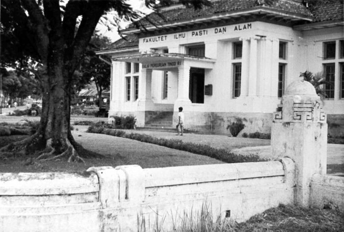 Gedung Fakultet Ilmu Pasti dan Alam Balai Perguruan Tinggi RI di "Huygensweg" Bandung setelah Februari 1950 (sekarang Jalan Tamansari No.64 Bandung, gedung ini digunakan sebagai Rektorat Institut Teknologi Bandung). Sebelumnya adalah Faculteit der Exacte Wetenschap Universiteit van Indonesie te Bandoeng (6 Oktober 1947-22 September 1948), kemudian menjadi Faculteit van Wiskunde en Natuurwetenschap (22 September 1948-2 Februari 1950).